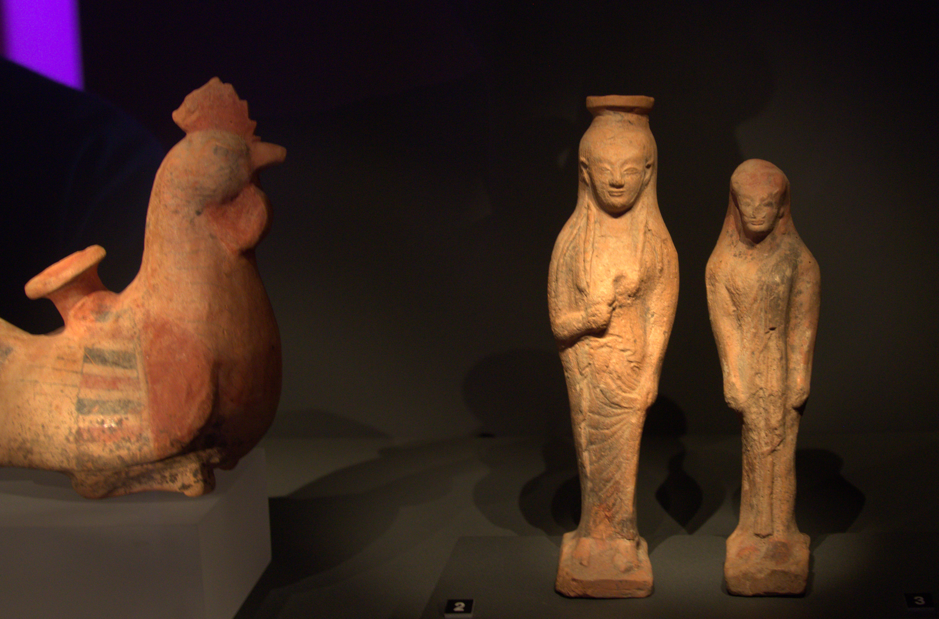 Cemetery of Sindos, male burial (25). c. 540 B.C. (ΜΘ 8215, ΜΘ 8214). Archaeological Museum of Thessaloniki, Greece. --- Πήλινο αρωματοδοχείο σε σχήμα πετεινού και σε μορφή κόρης. Νεκροταφείο Σίνδου, ανδρικός τάφος (25). Γύρω στο 540 π.Χ. (ΜΘ 8215, ΜΘ 8214). Αρχαιολογικό Μουσείο Θεσσαλονίκης.